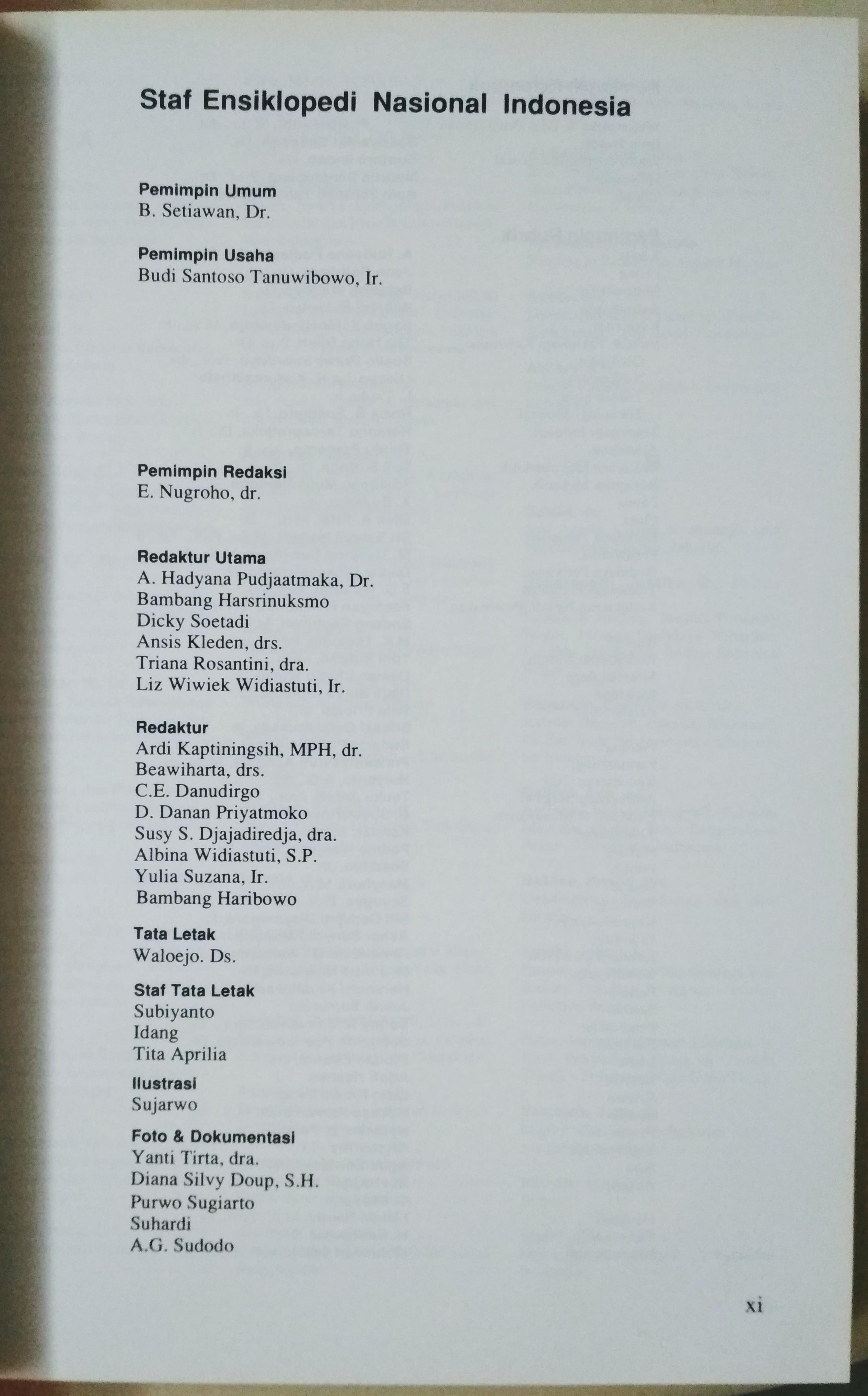 Daftar redaksi dari cetakan pertama